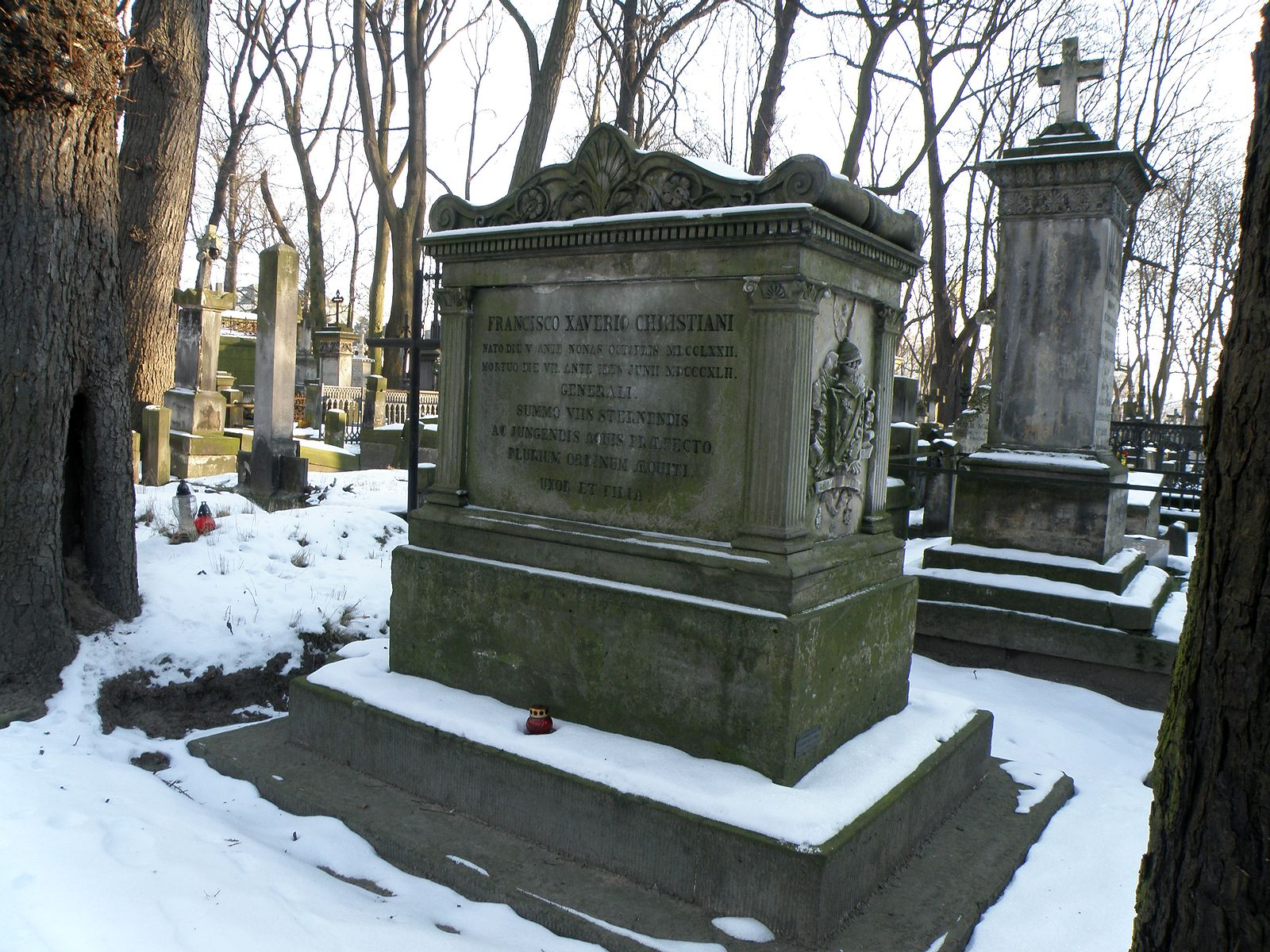 Franciszek Ksawery Christiani, nagrobek na Powązkach